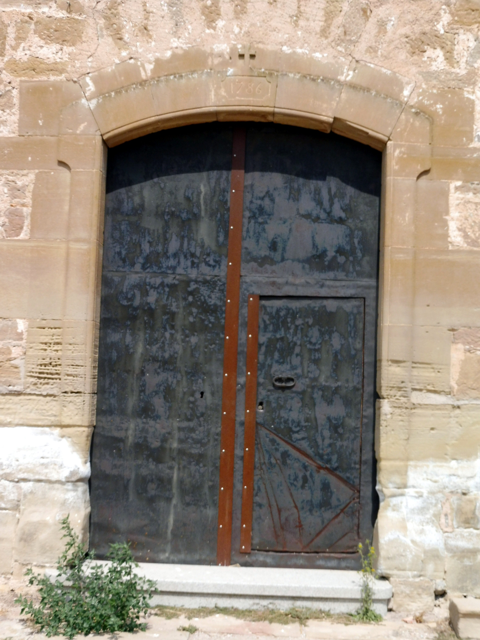 Santuari de la Mare de Déu del Puig del Ram (Veciana): portada